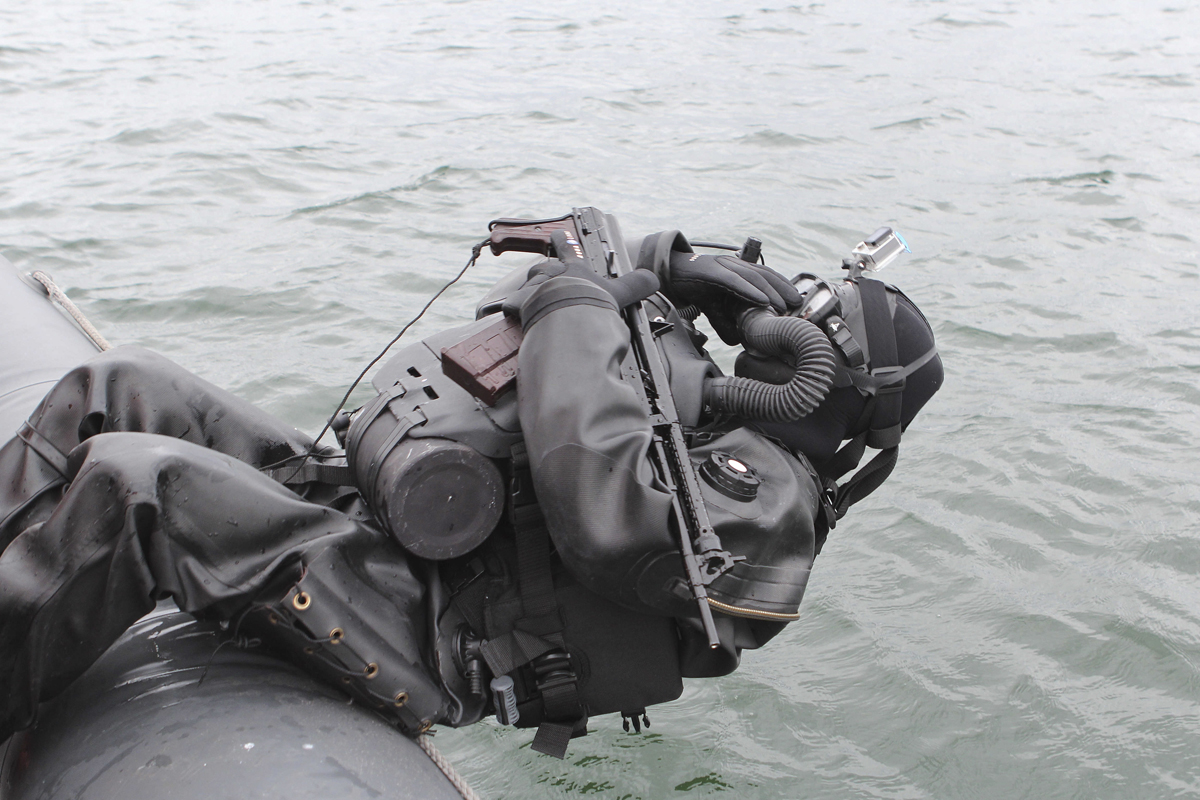 Тренировка 313-го отряда специального назначения борьбы с подводными диверсионными силами и средствами Балтийской военно-морской базы.